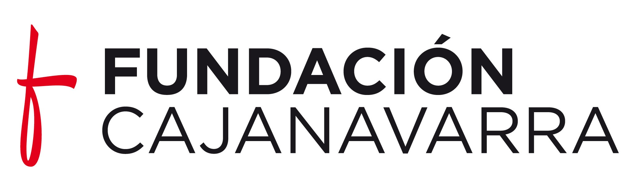 Logo Fundación Caja Navarra